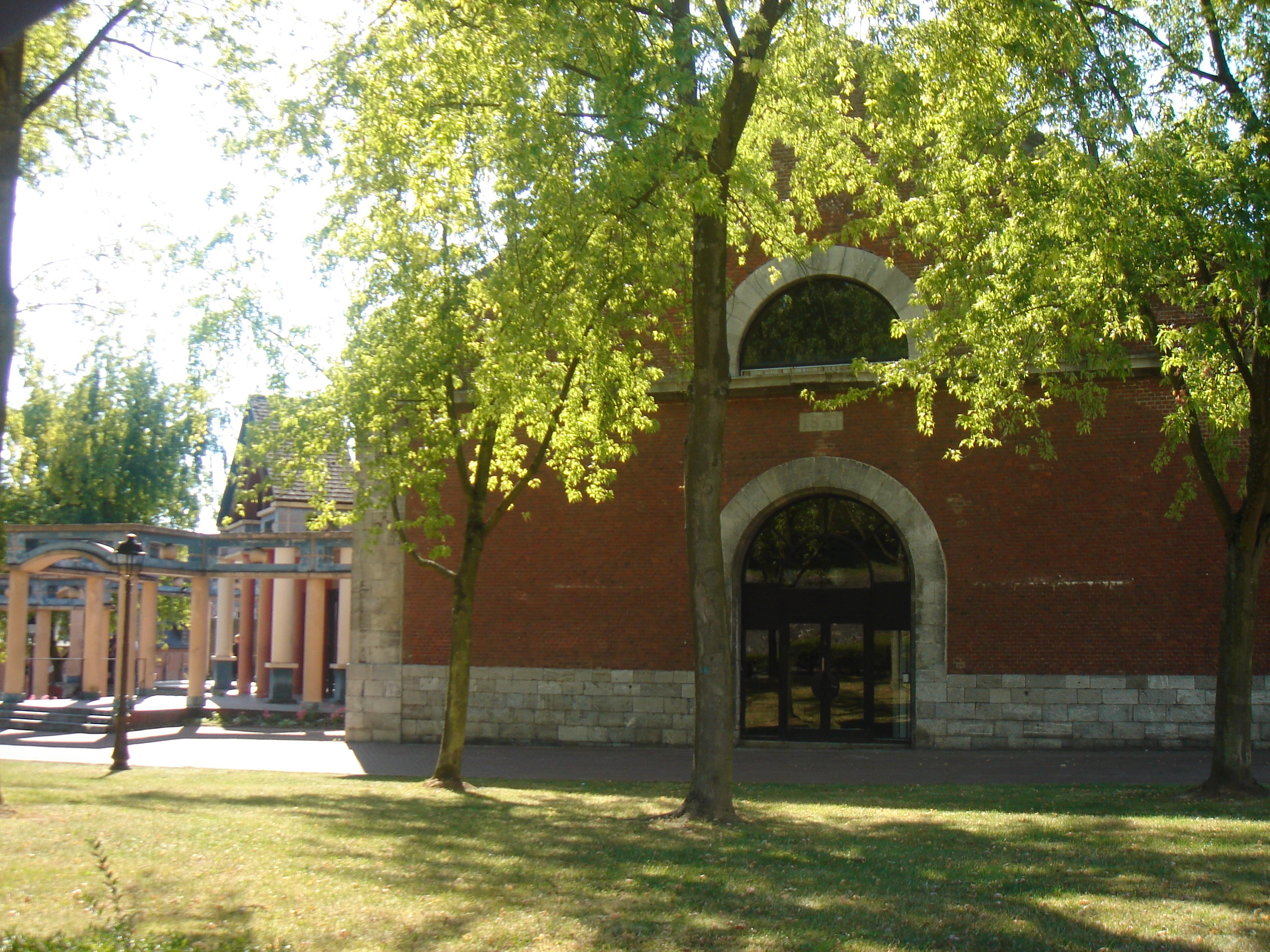 Théâtre du Manège Maubeuge - France